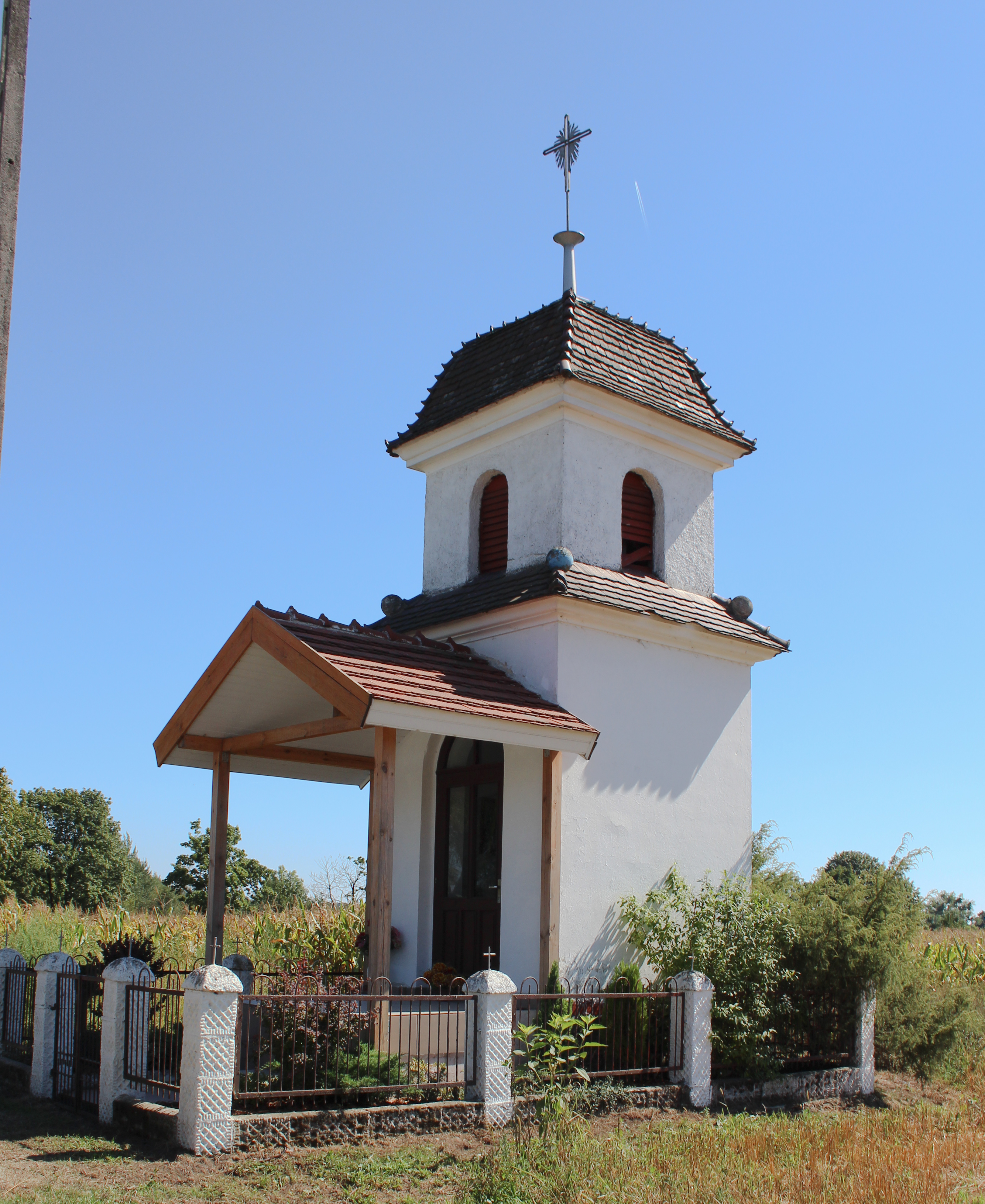 Kaplica w Ligocie Tułowickiej - wieś w Polsce w województwie opolskim, w powiecie opolskim w gminie Tułowice.